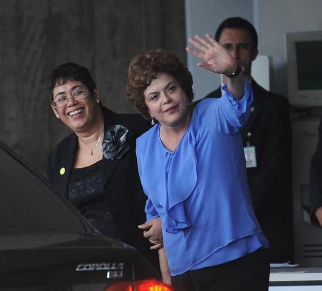 Brasília - A nova ministra da Casa Civil, Erenice Guerra, e Dilma Rousseff, pré-candidata do PT à Presidência da República, no Centro Cultural Banco do Brasil (CCBB), sede provisória da Presidência da República (Fabio Rodrigues Pozzebom/ABr)